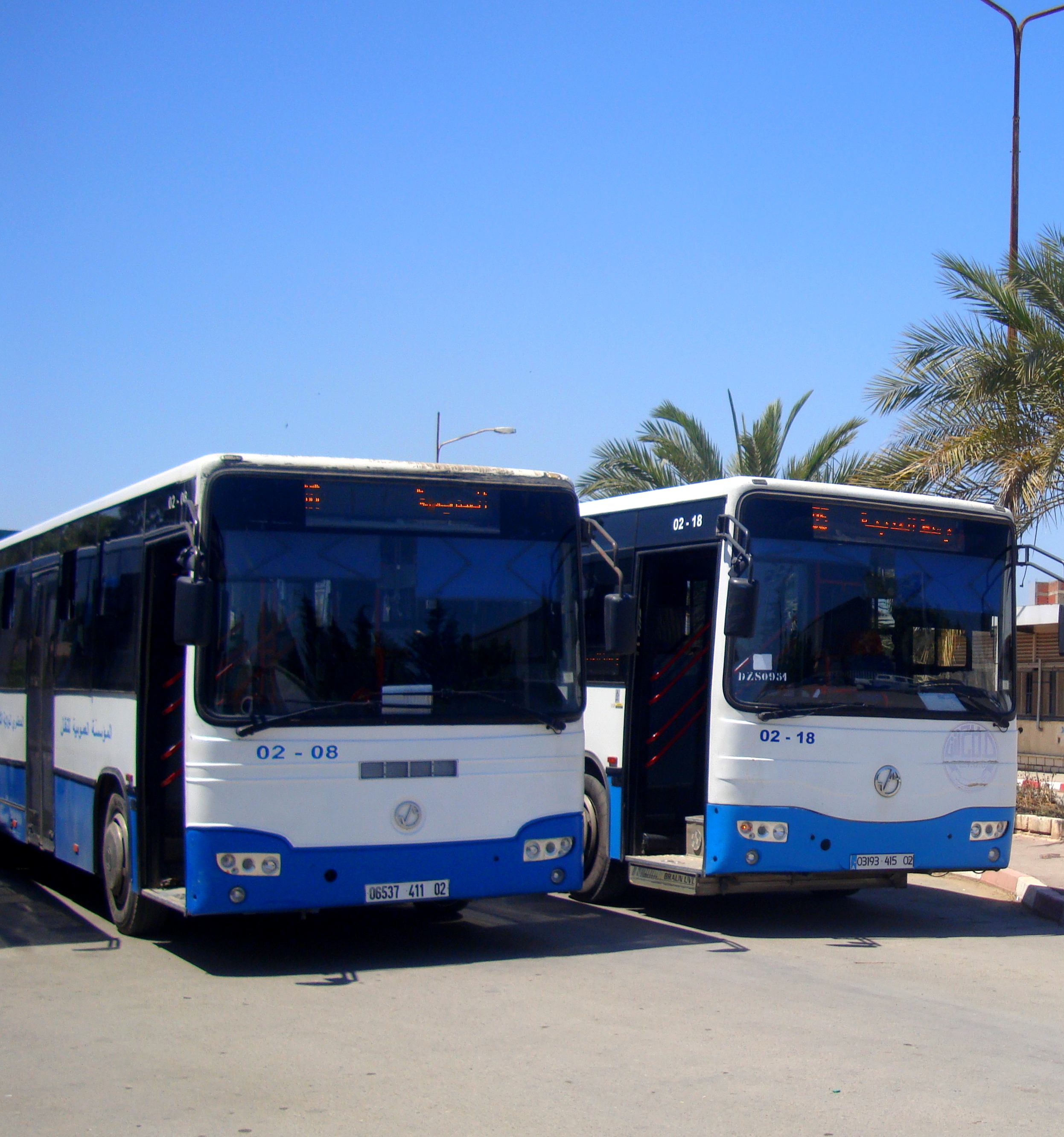 02 Bus stationnés au terminus (La gare ferroviaire) du réseau CHLEF BUS, photo prise en mai 2019.